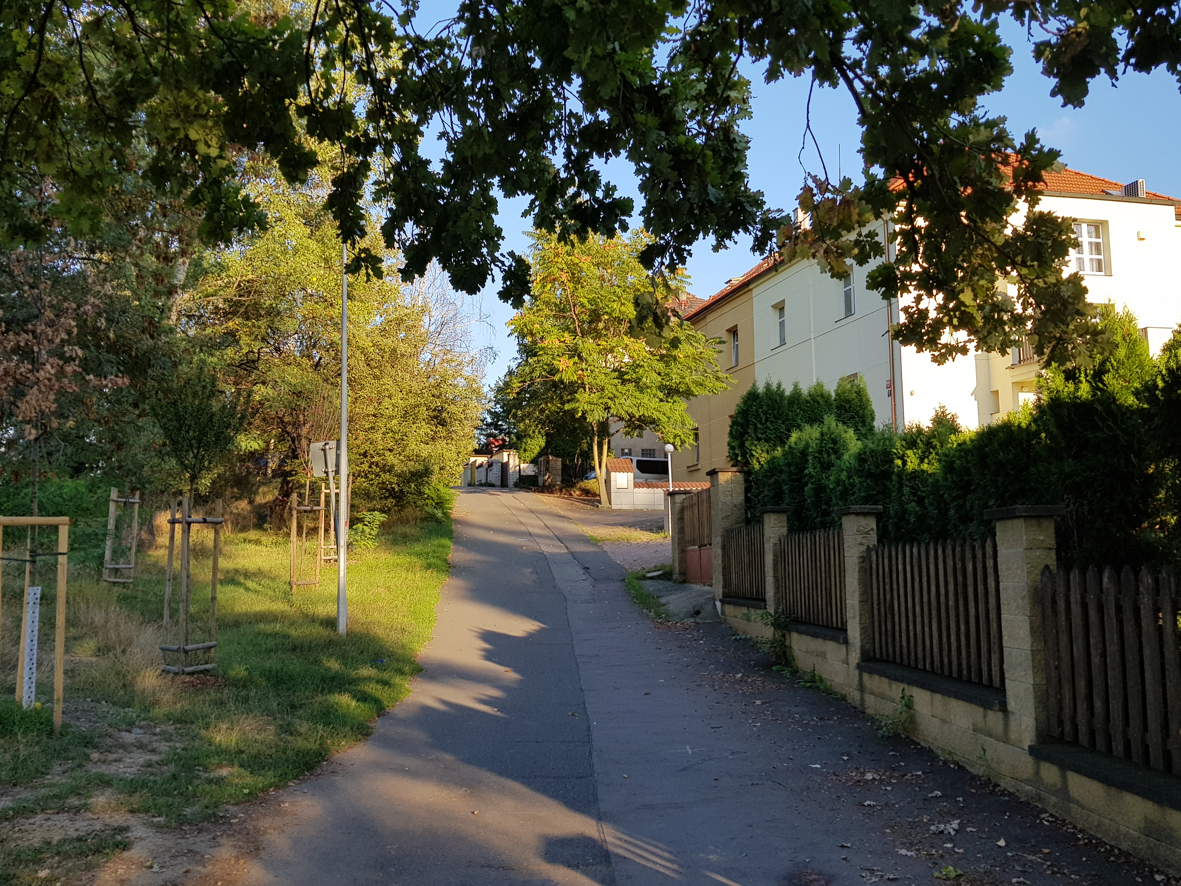 Ulice K Hutím, Praha 14 - Hloubětín, západní úsek, pohled na východ